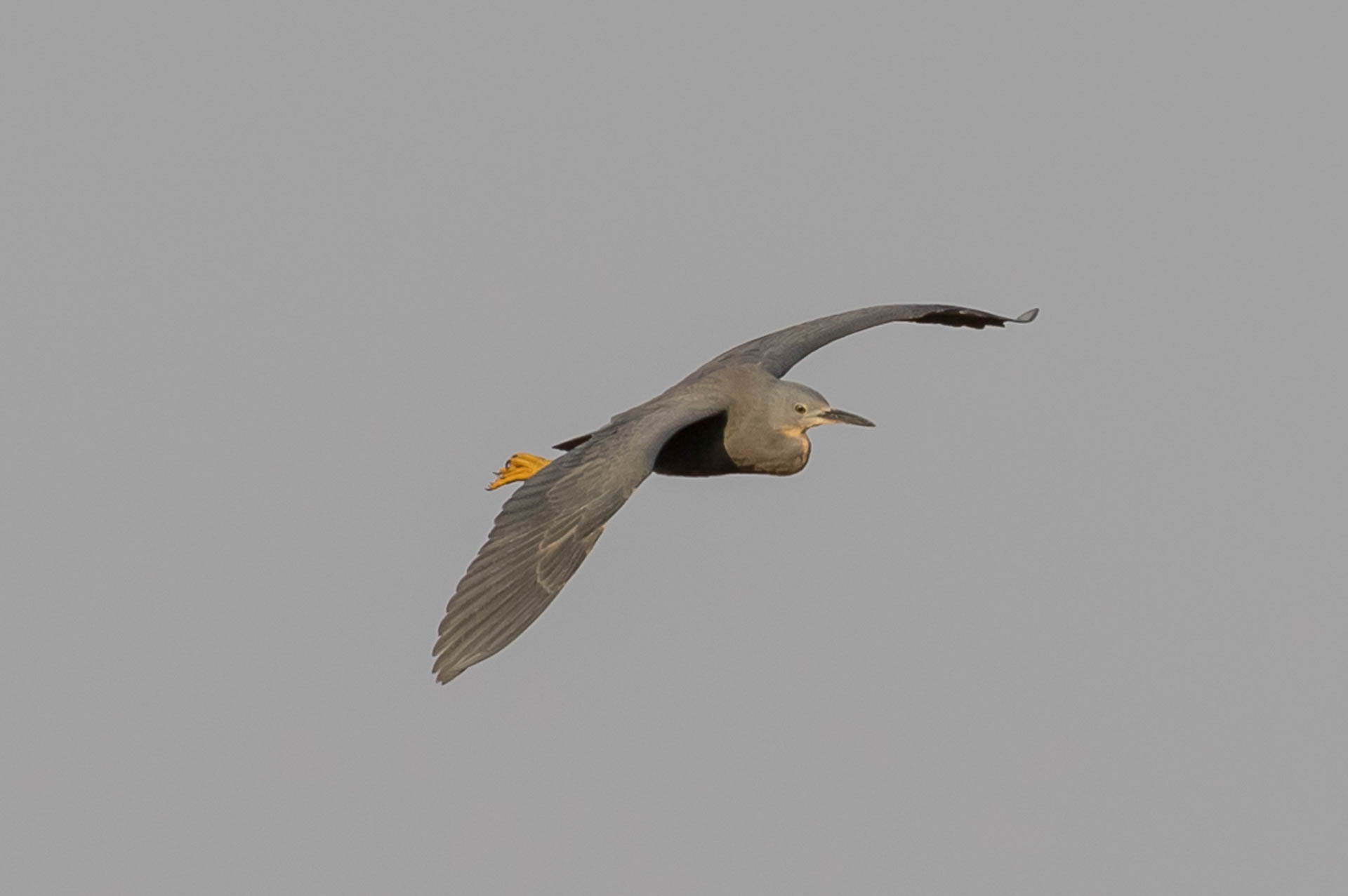 Slaty Egret, close to Mahangu Safari Lodge, 7D2 0186 s